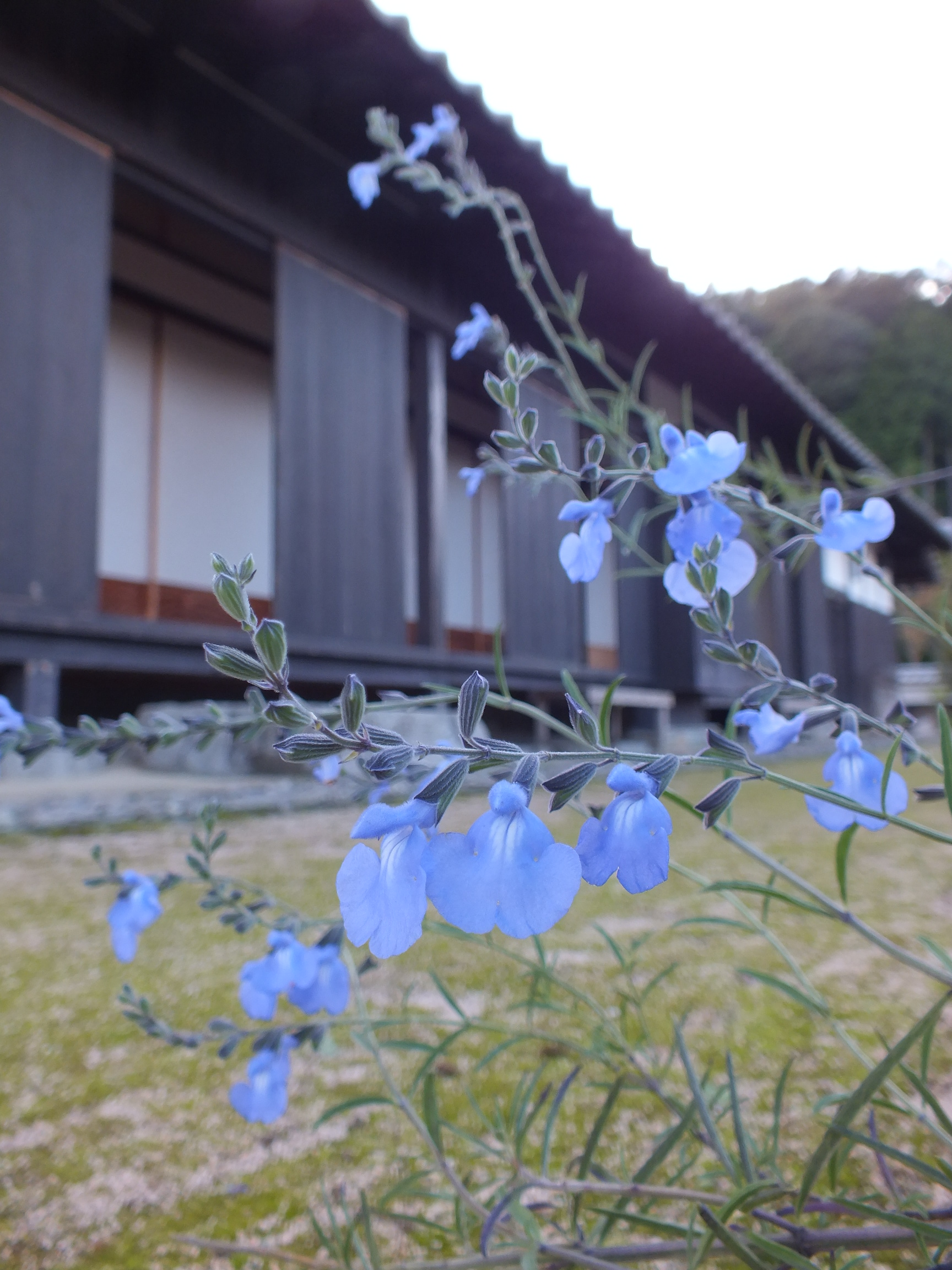 Salvia azurea Blue sage サルビア・アズレア 丹波並木道公園